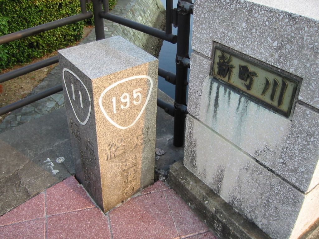 Kachidoki bridge, Tokushima, Tokushima Pref., Japan.